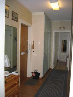 Eteinen Eteinen